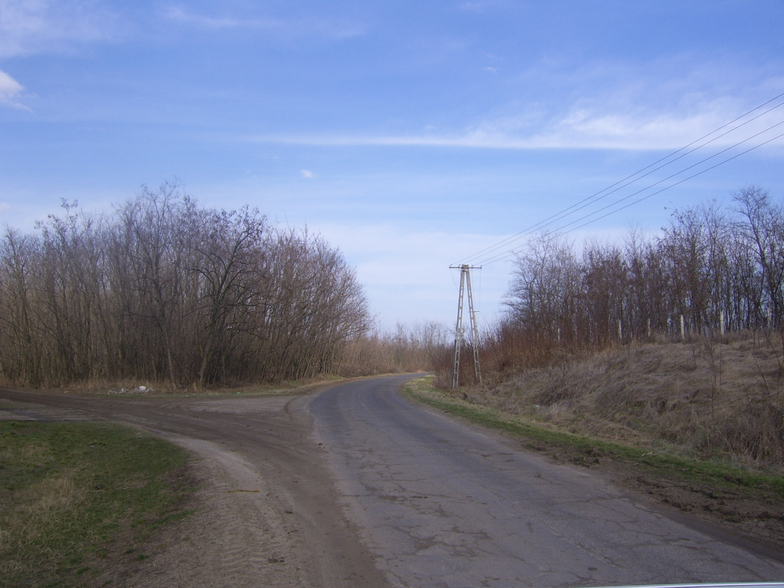 Utcarészlet, Perkedpuszta-Dugó tanyán (Balkány)